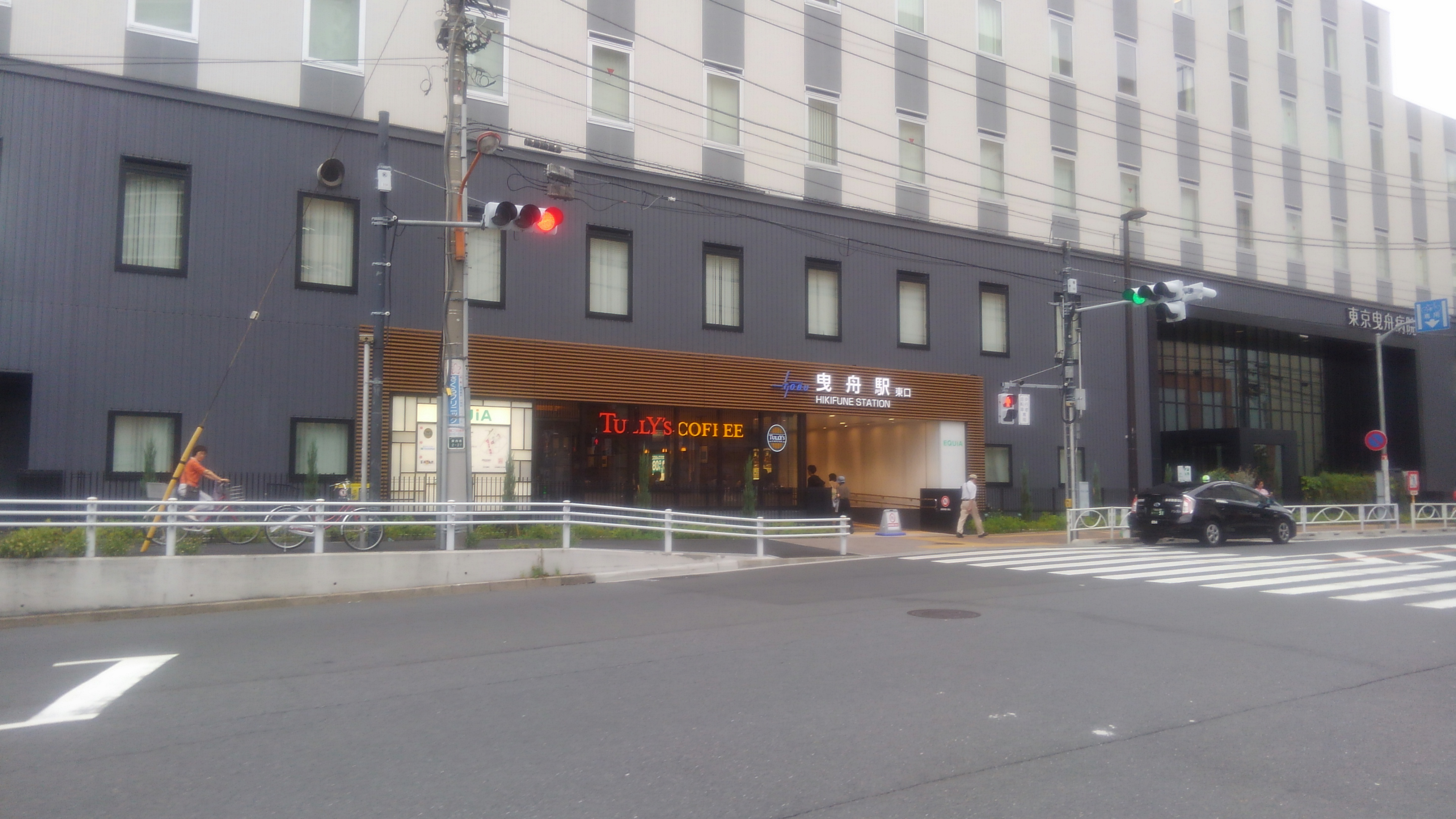 東武曳舟駅東口